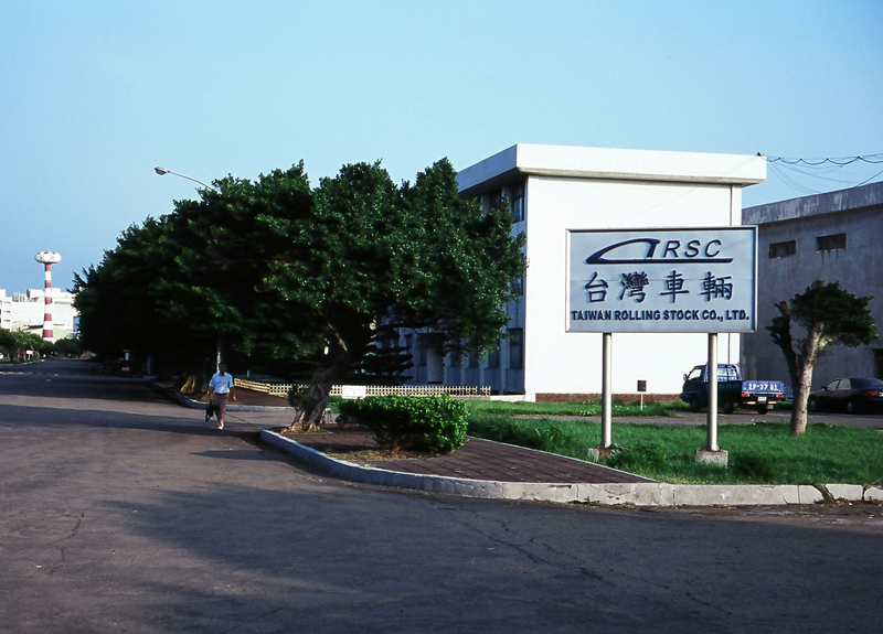 臺灣車輛,背後為行政大樓